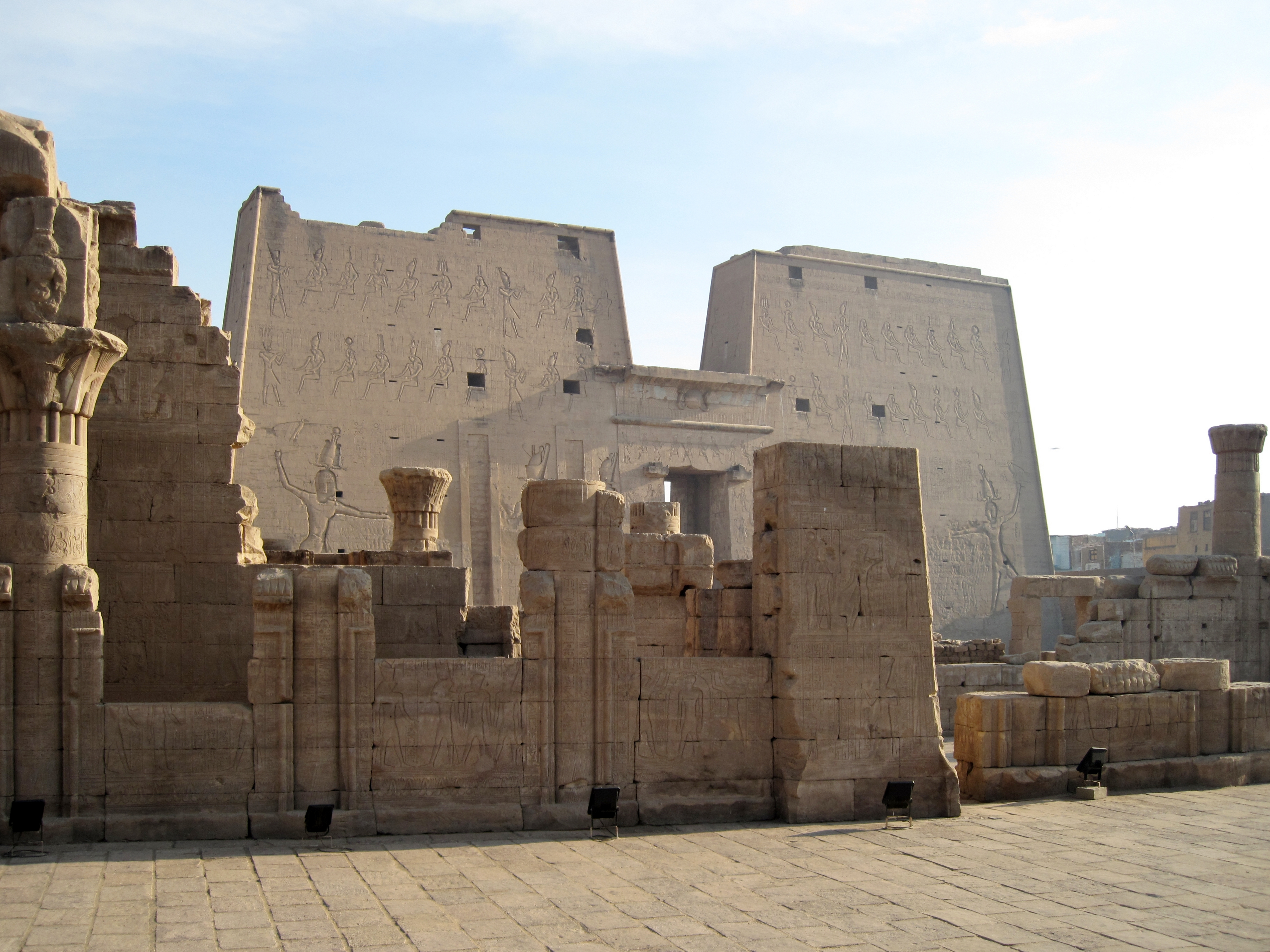 Tempel von Edfu, Ägypten